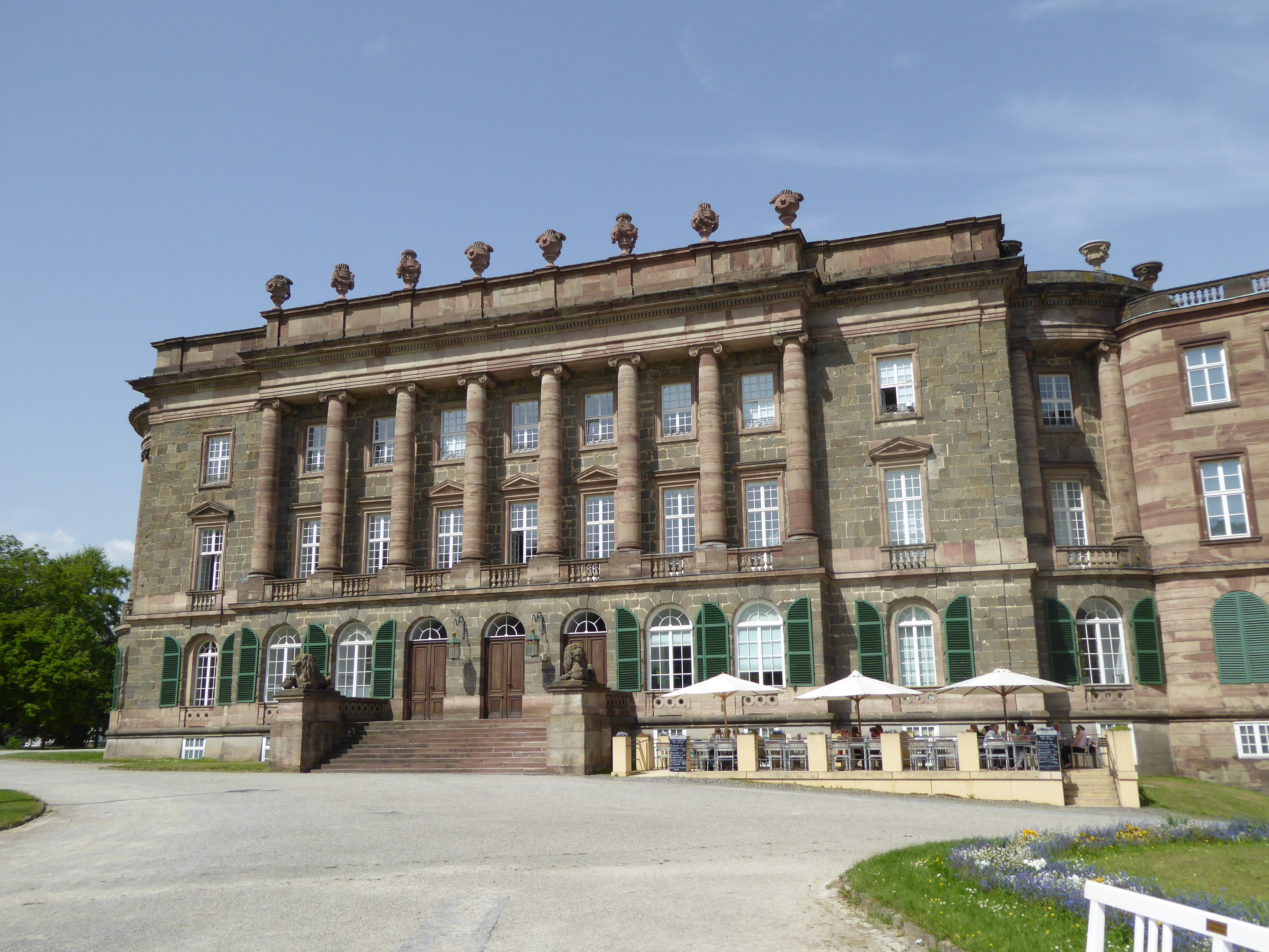 Schloss Wilhlemshöhe in Kassel